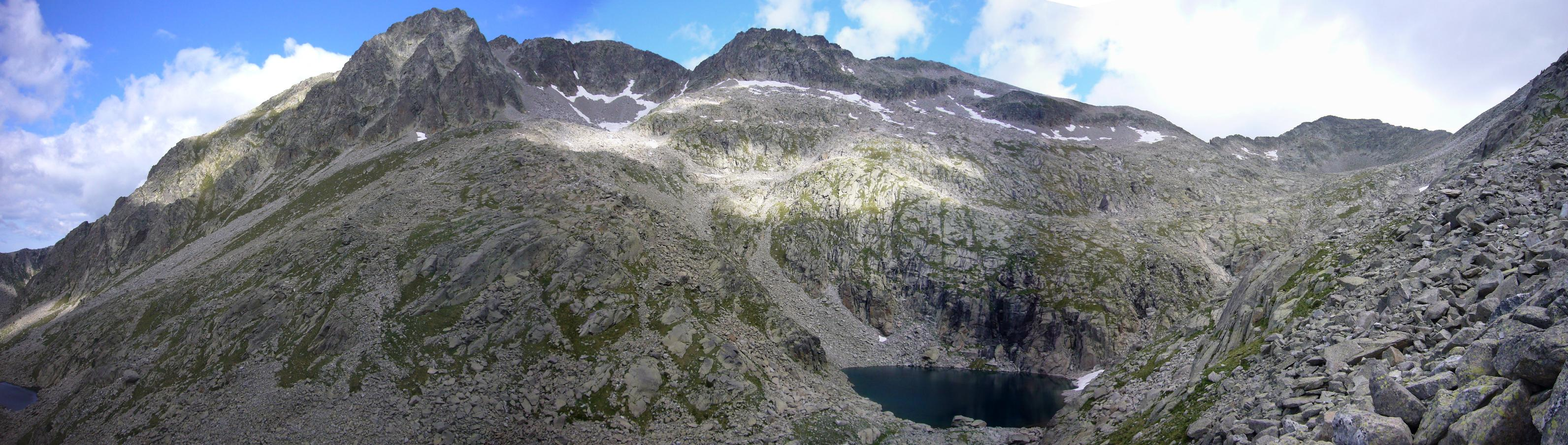 Estany de Sarradé d'Amunt, Pala Alta de Sarradé (a segon pla), Crestes Barrades, Coll de Colieto i Pic de Contraix, vistos des de la part alta de la Vall de Sarradé; la Vall de Boí, Alta Ribagorça, Catalunya